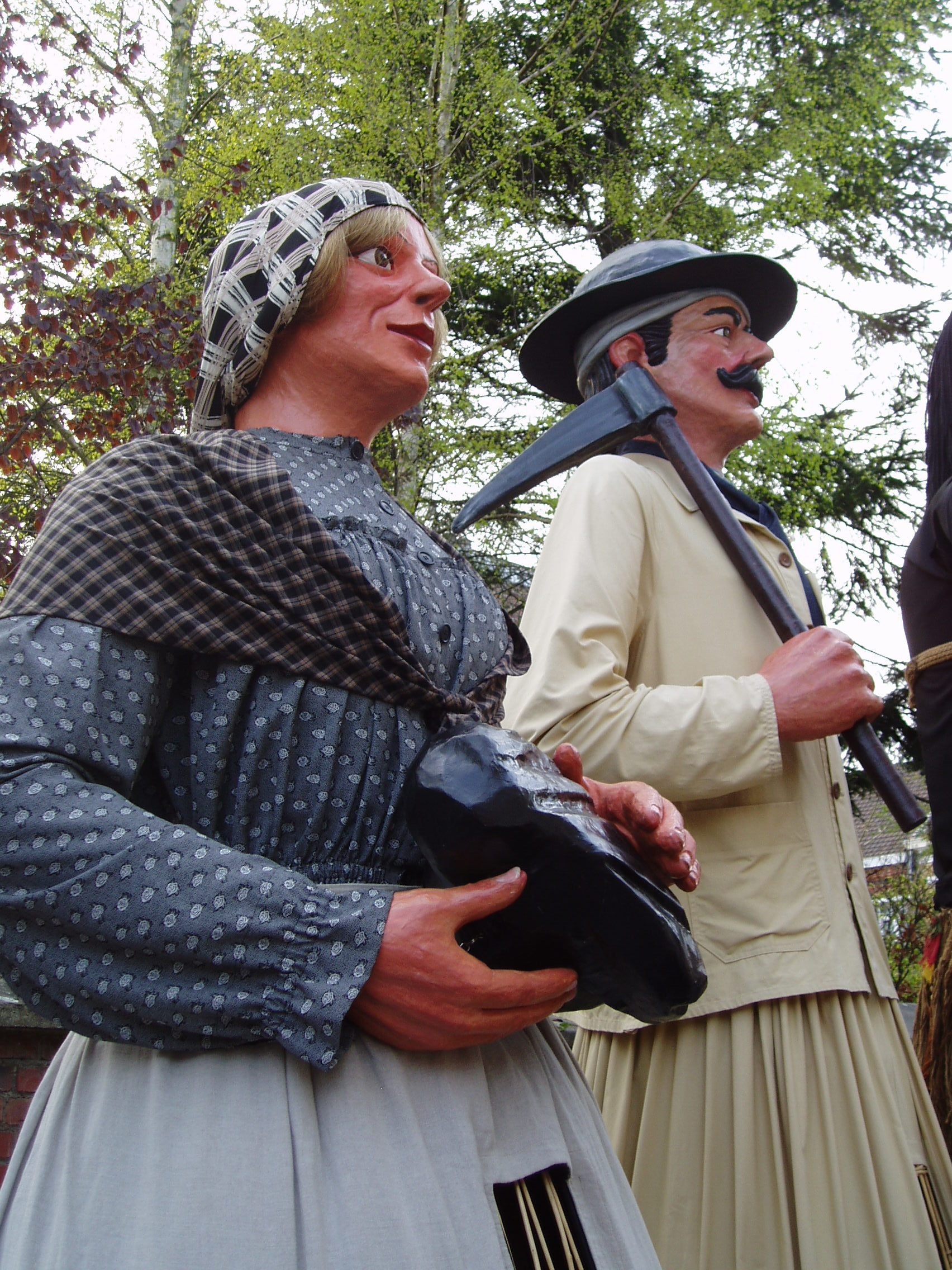 Ronde européenne de géants portés - Steenvoorde 2006 Les géants de Andréa et l'Zeph de Waziers